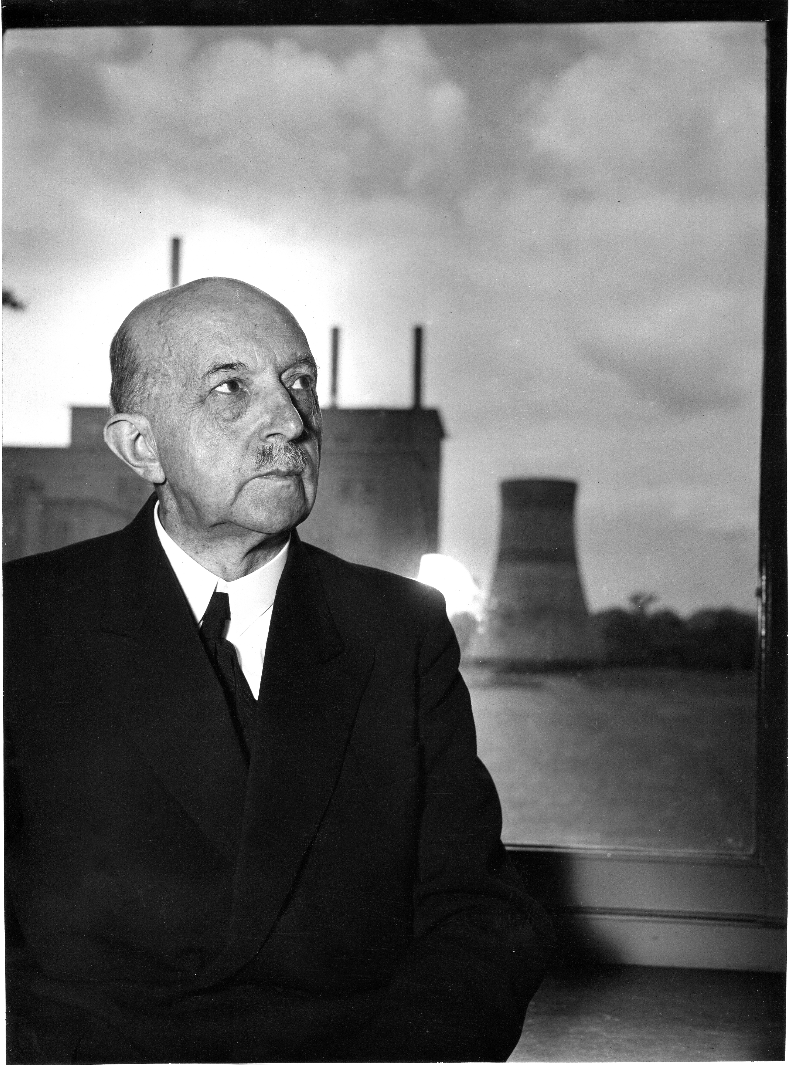 Portret met de mijngebouwen op de achtergrond